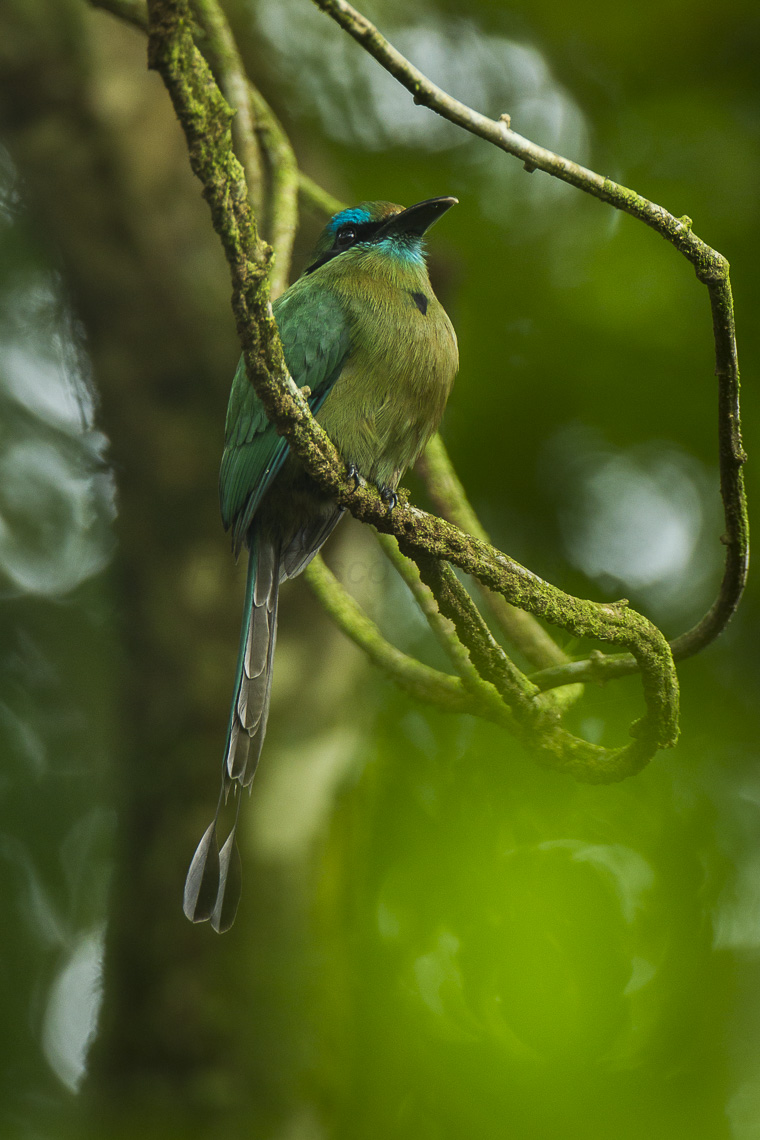 Keel-billed Motmot - Sarapiqui - Costa Rica_S4E1001